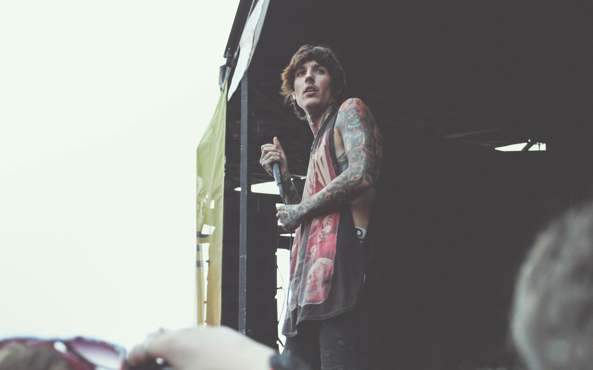 Оливер Сайкс